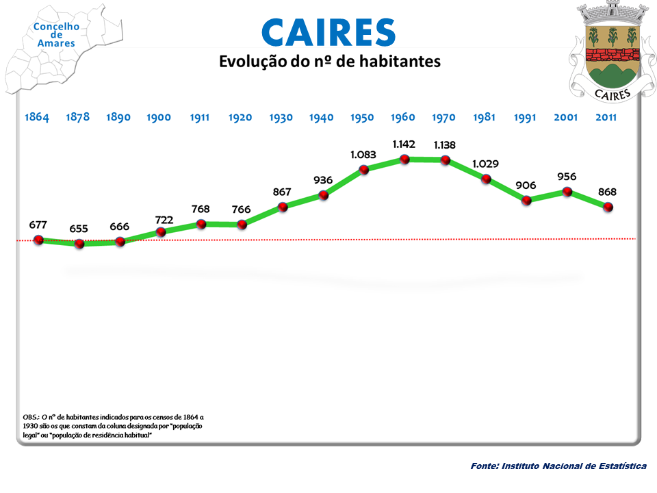 Censo 2011